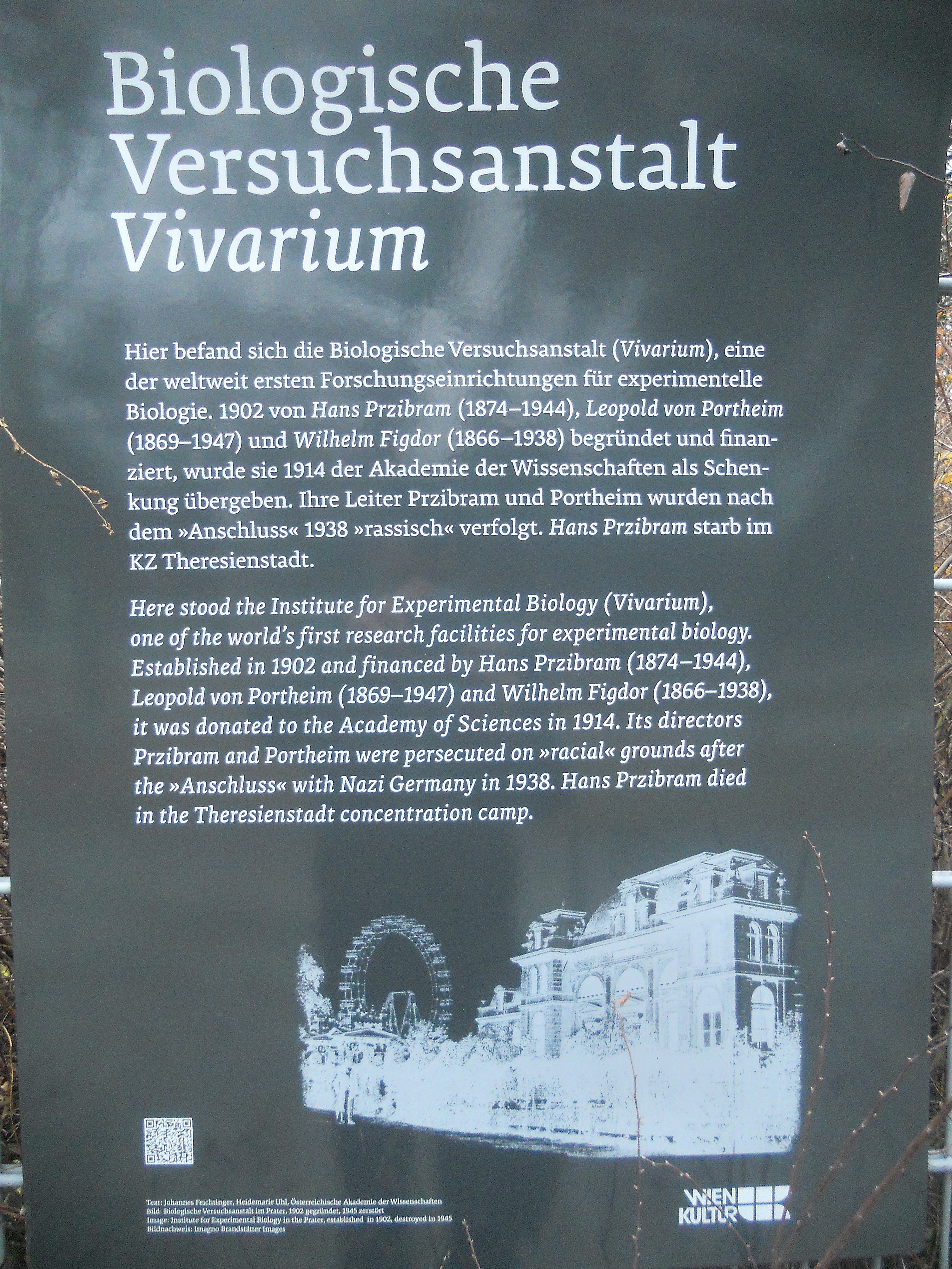 Vivarium – Gedenktafel